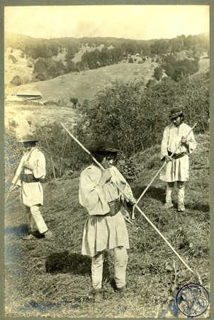 Adler - Cositul ierbii pe dealurile din Vulcan, jud. Hunedoara